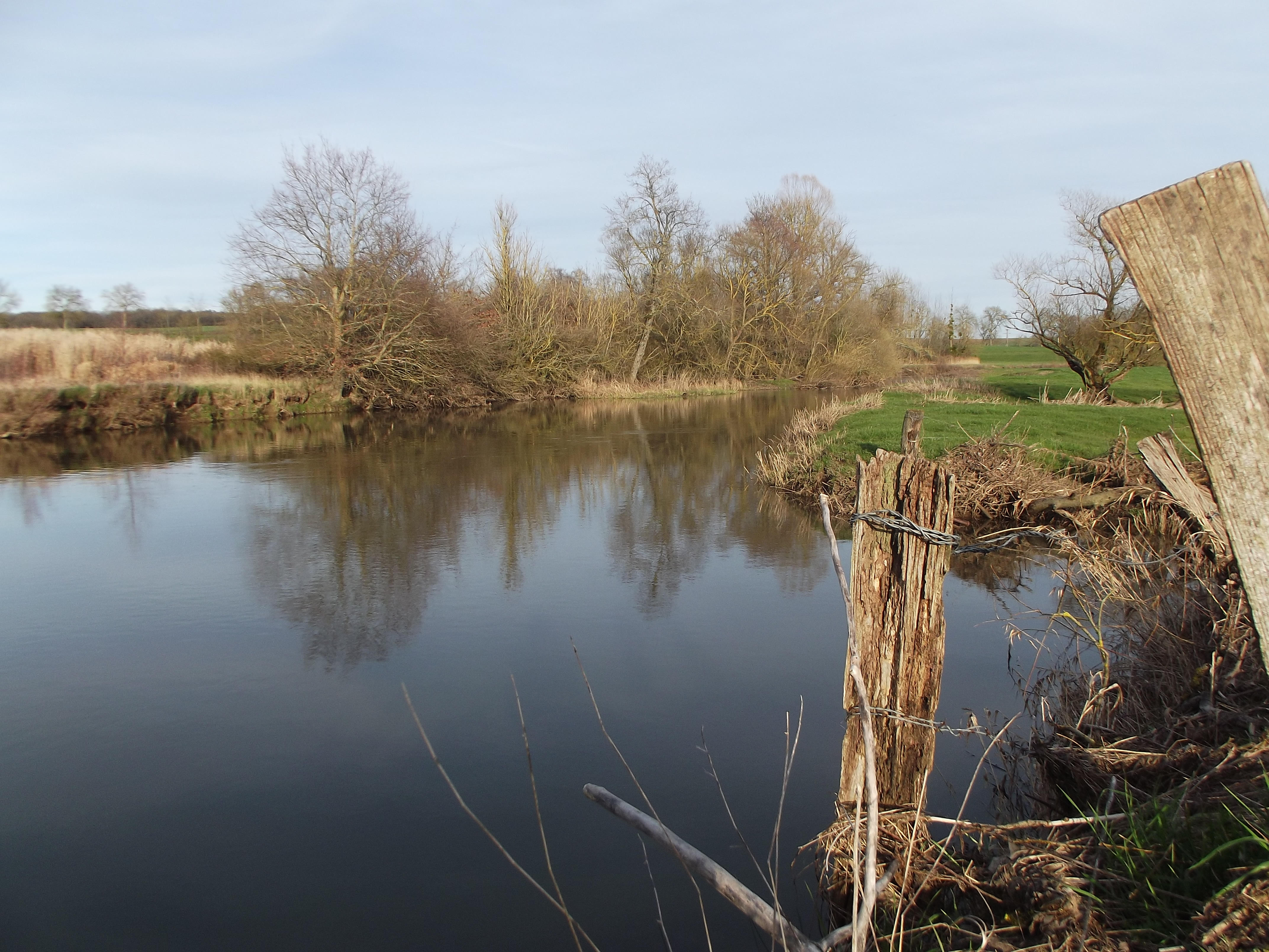 Commune de Haudonville - Département de Meurthe et Moselle - Photographie personnelle, prise le 21 mars 2020 - Copyright © Audric Touvron